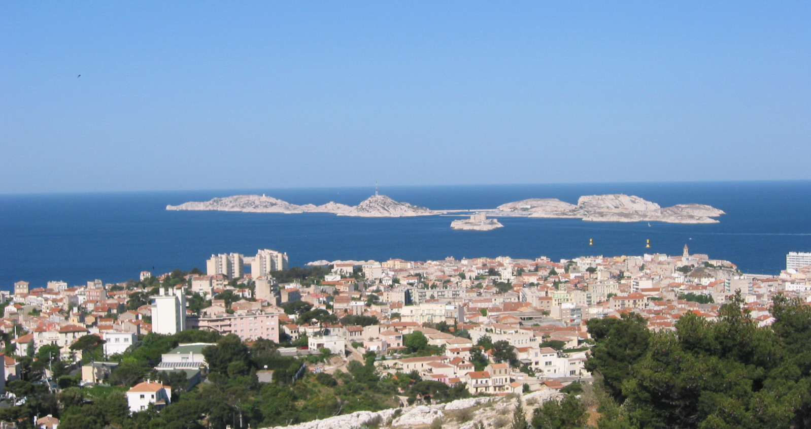 Marseille, Bouches-du-Rhône, France Archipel du Frioul Photo prise le 19 mai 2006 Aut : Jddmano